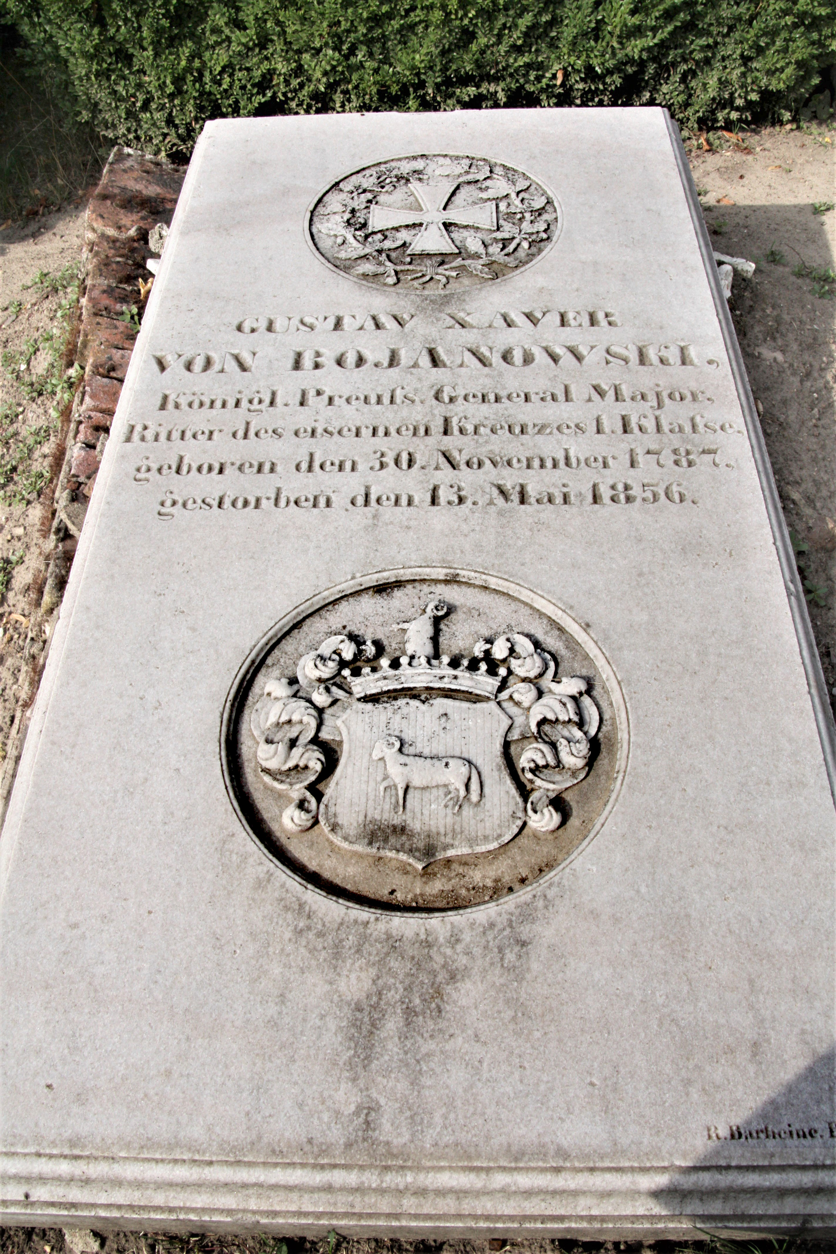 GUSTAV XAVER VON BOJANOWSKIKönigl. Preuß. General MajorRitter des eisernen Kreuzes 1. Klassegeboren den 30. November 1787gestorben den 13. Mai 1856.